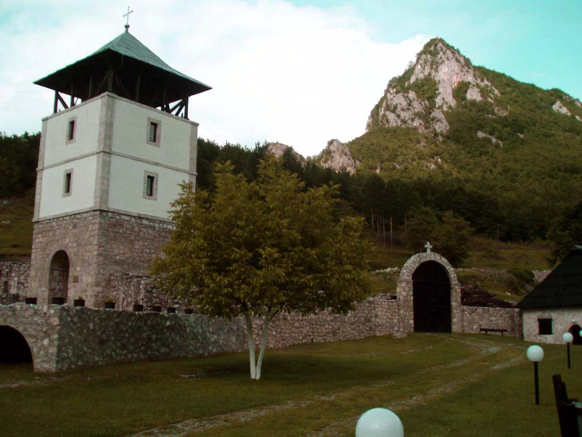 Kula kod manastira